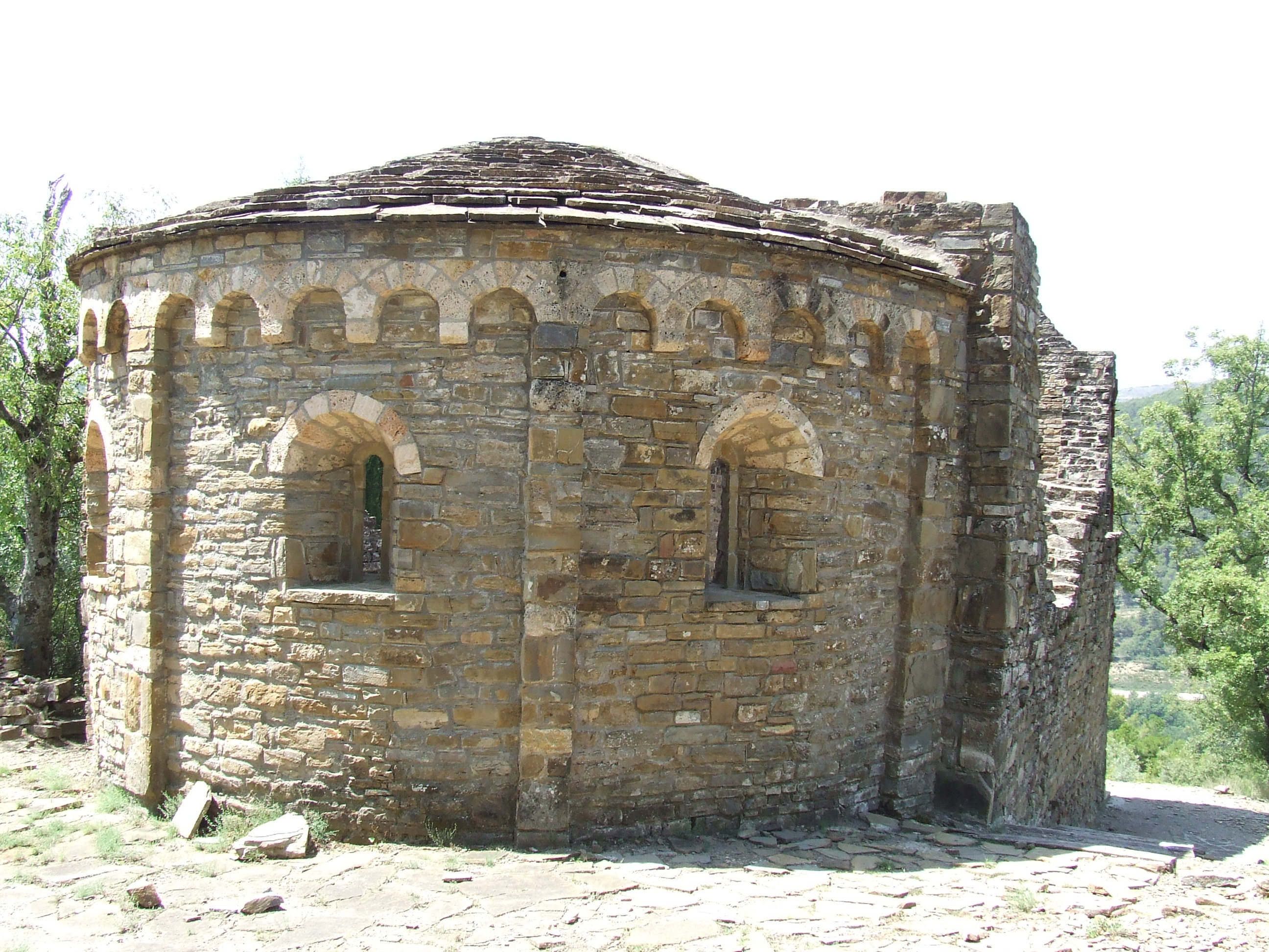 Absis, exterior, de Sant Miquel del Pui Vell (la Pobla de Segur, Pallars Jussà)